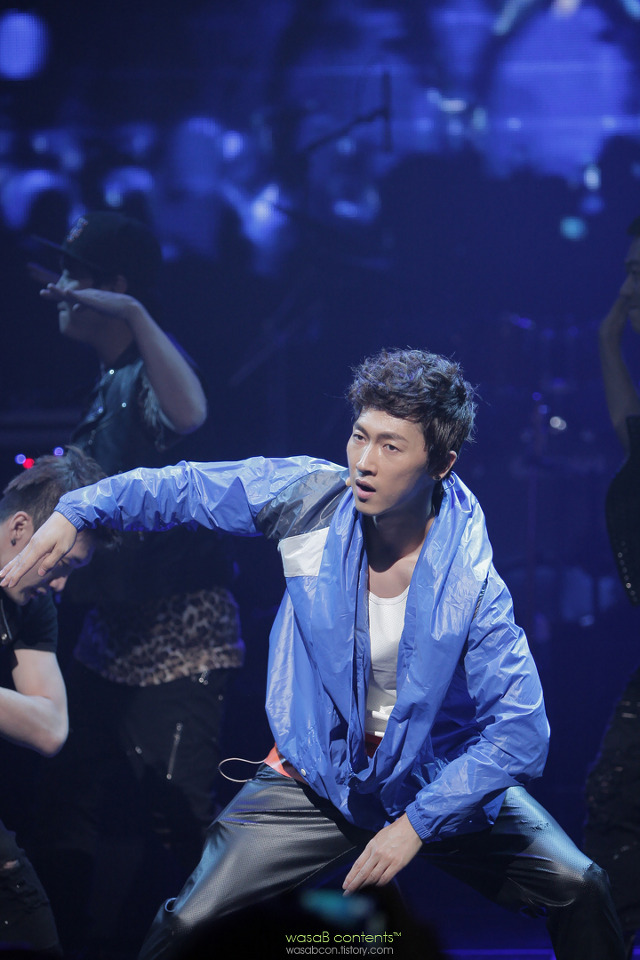 가수 장우혁